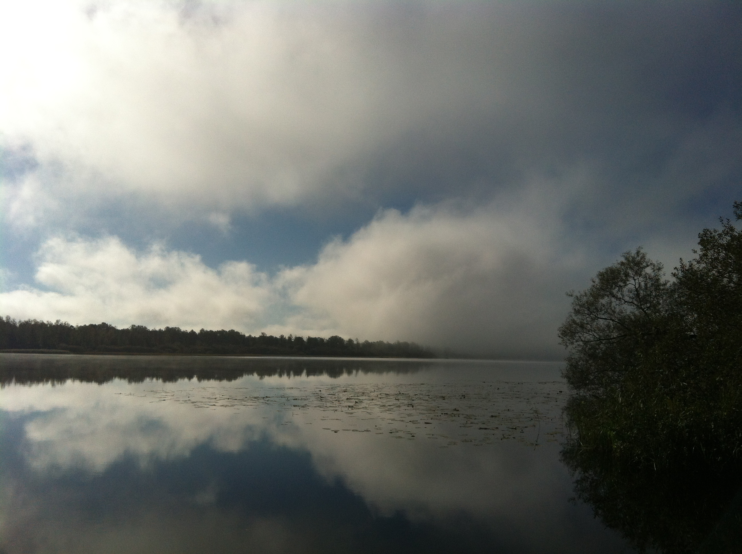 Sjön Salen vid Alvesta.